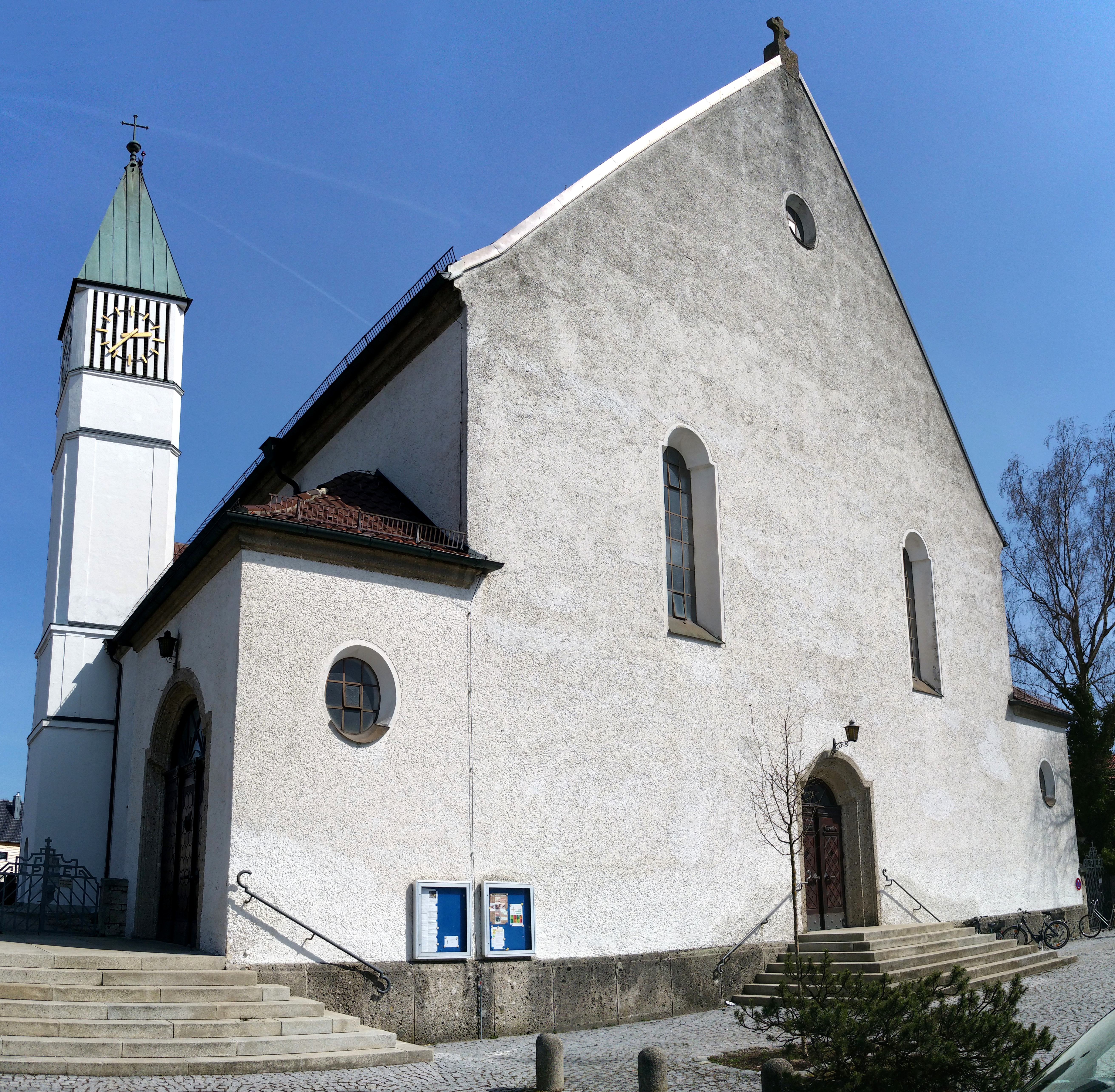 Deutschland, Bayern, Oberbayern, Landkreis Fürstenfeldbruck, Gemeinde Emmering, katholische Pfarrkirche St. Johnannes der Täufer